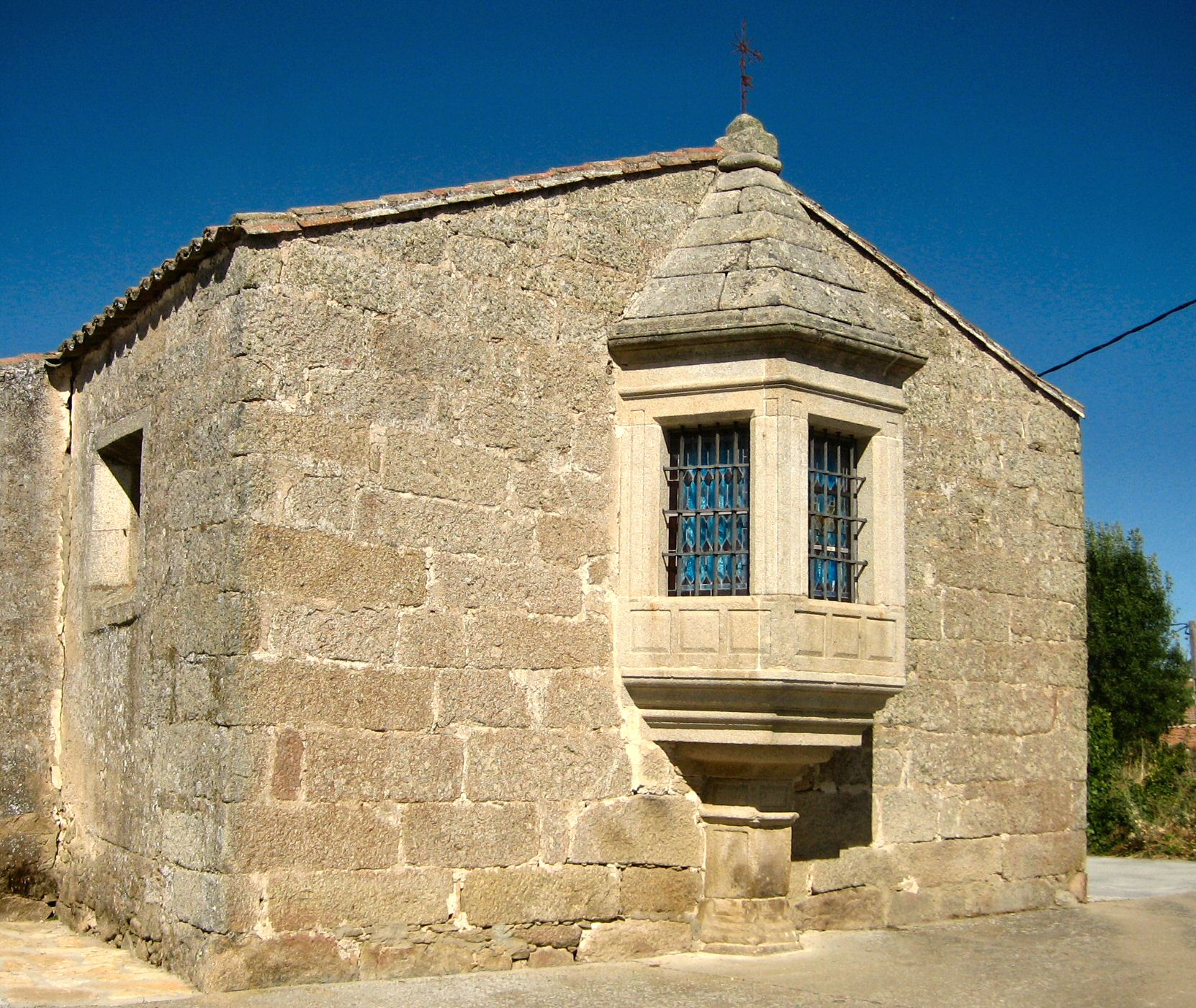 Parte trasera de la ermita de Mediavilla, en Villamor de la Ladre, mostrando el camarín de la Virgen